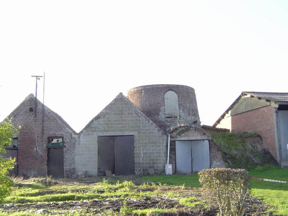 Beernem Blind Ezelstraat 1